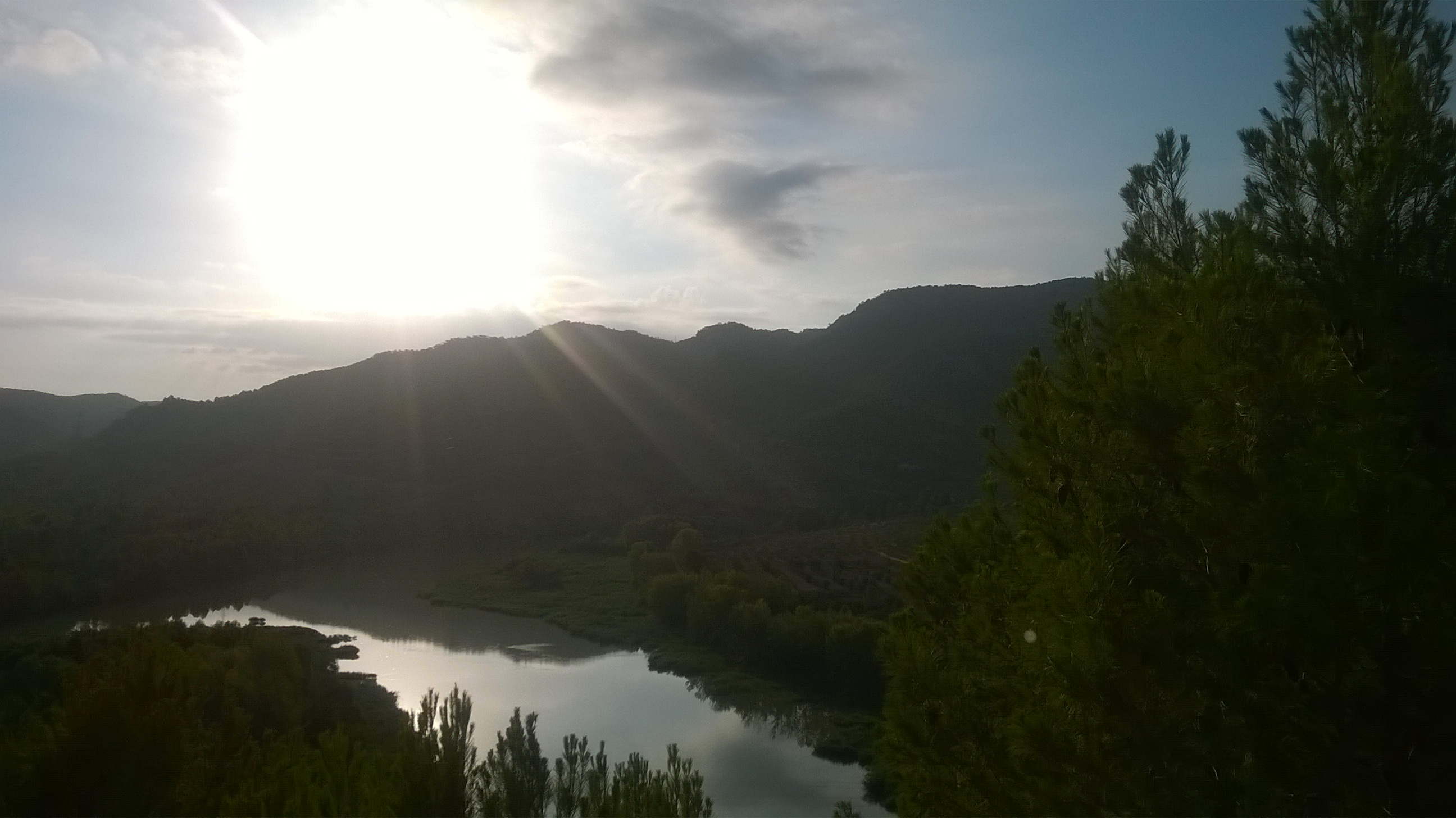 Vistas de Cofrentes tomadas durante el verano de 2014 por Isabel Valiente de la Granja.